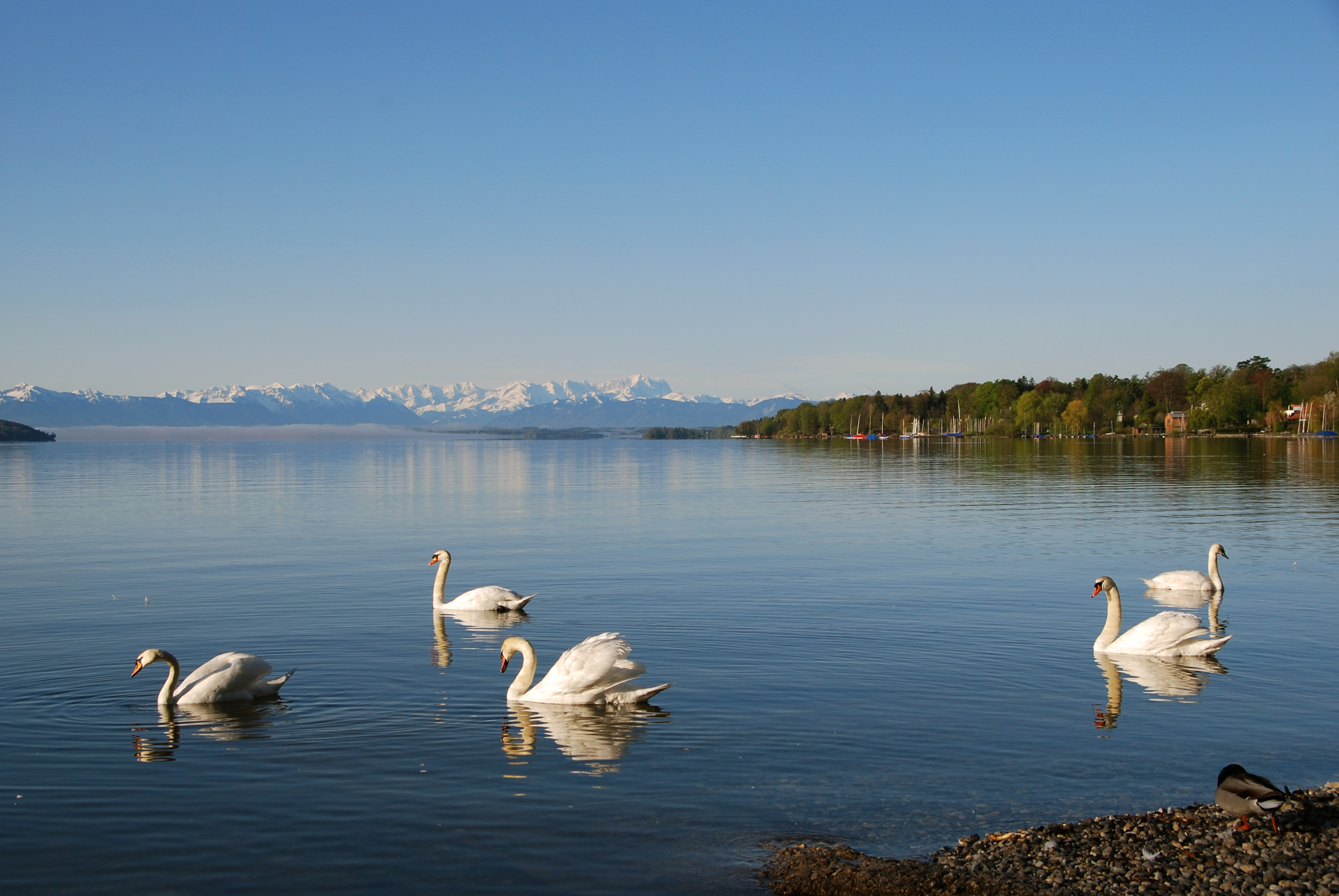 Starnberg, Seepromenade mit Blick nach Süden zum Wettersteingebirge.